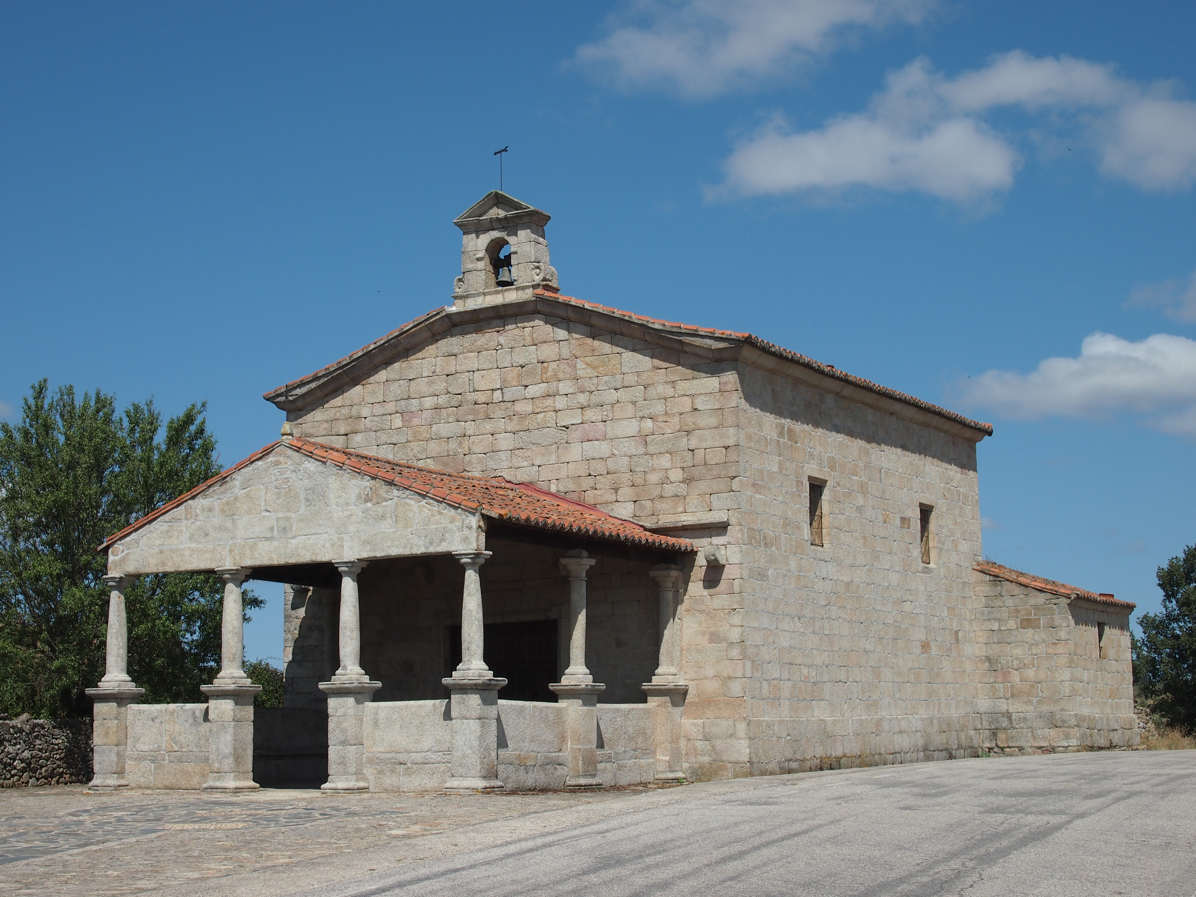 Ermita del Cristo de las Mercedes en Barruecopardo, Salamanca (España)